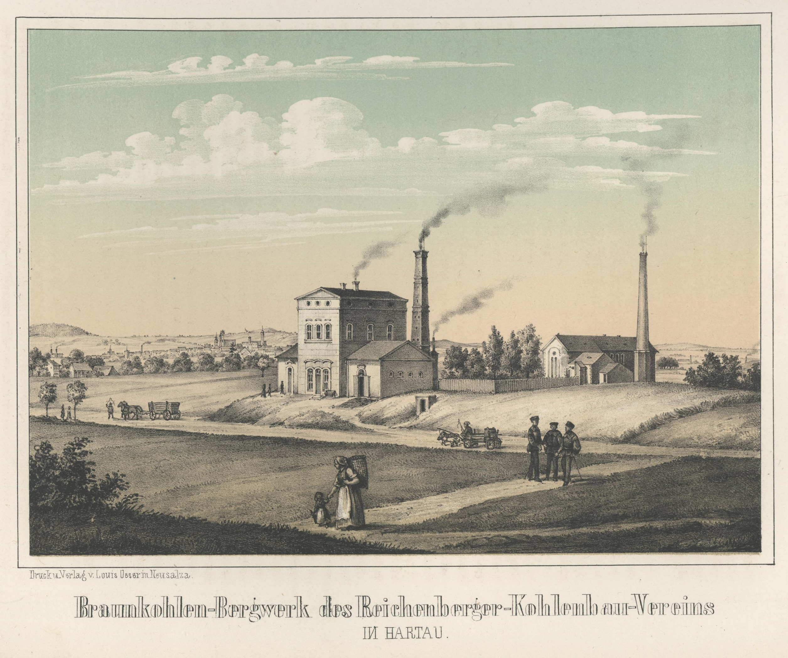 Braunkohlen-Bergwerk des Reichenberger-Kohlenbau-Vereins in Hartau aus: Album der Sächsischen Industrie Erster Band